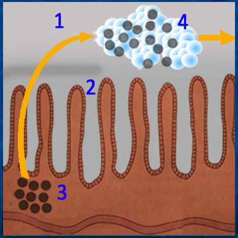 Схема. Полиметилсилоксан полигдрат (энтеросгель) устраняет рециркуляцию метаболитов и токсических веществ в кишечнике. Метаболиты и токсические вещества в просвете кишки связываются препаратом и выводятся наружу.